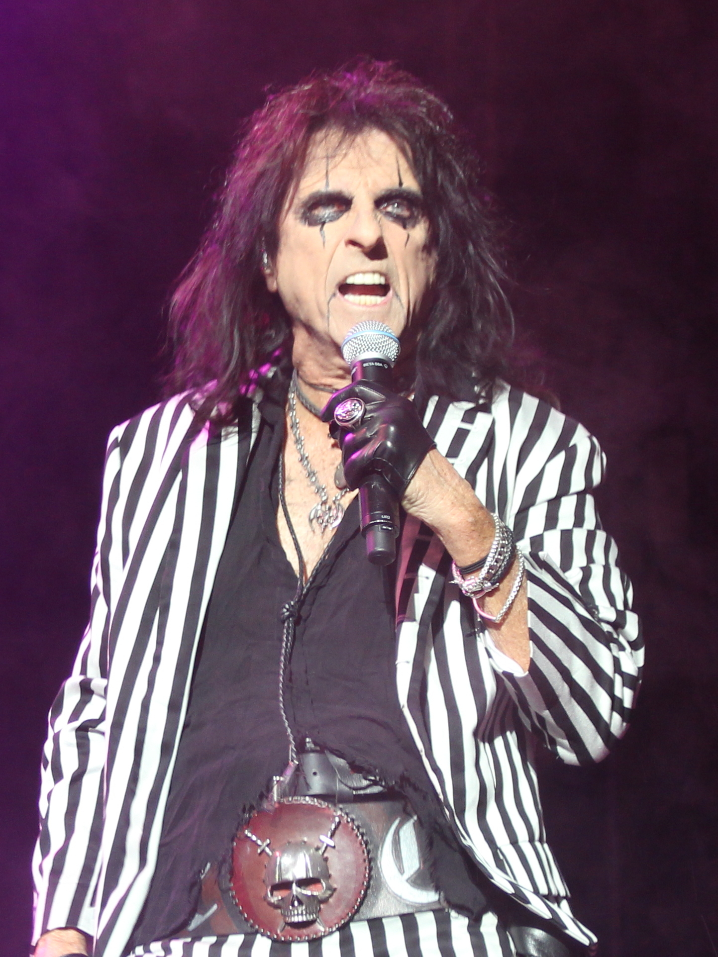 Festivalsommer This photo was created with the support of donations to Wikimedia Deutschland in the context of the CPB project "Festival Summer". Personality rights warningAlthough this work is freely licensed or in the public domain, the person(s) shown may have rights that legally restrict certain re-uses unless those depicted consent to such uses. In these cases, a model release or other evidence of consent could protect you from infringement claims.